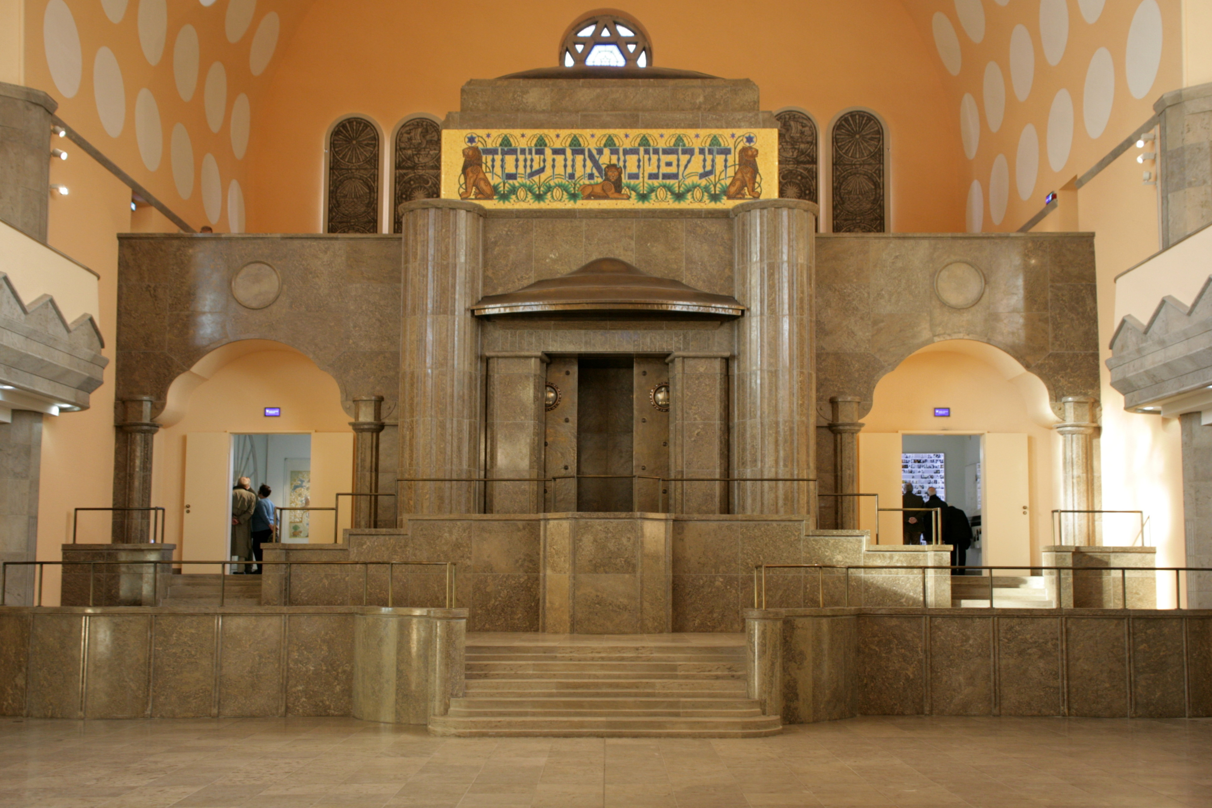 Alte Synagoge, Steeler Straße 29 in Essen